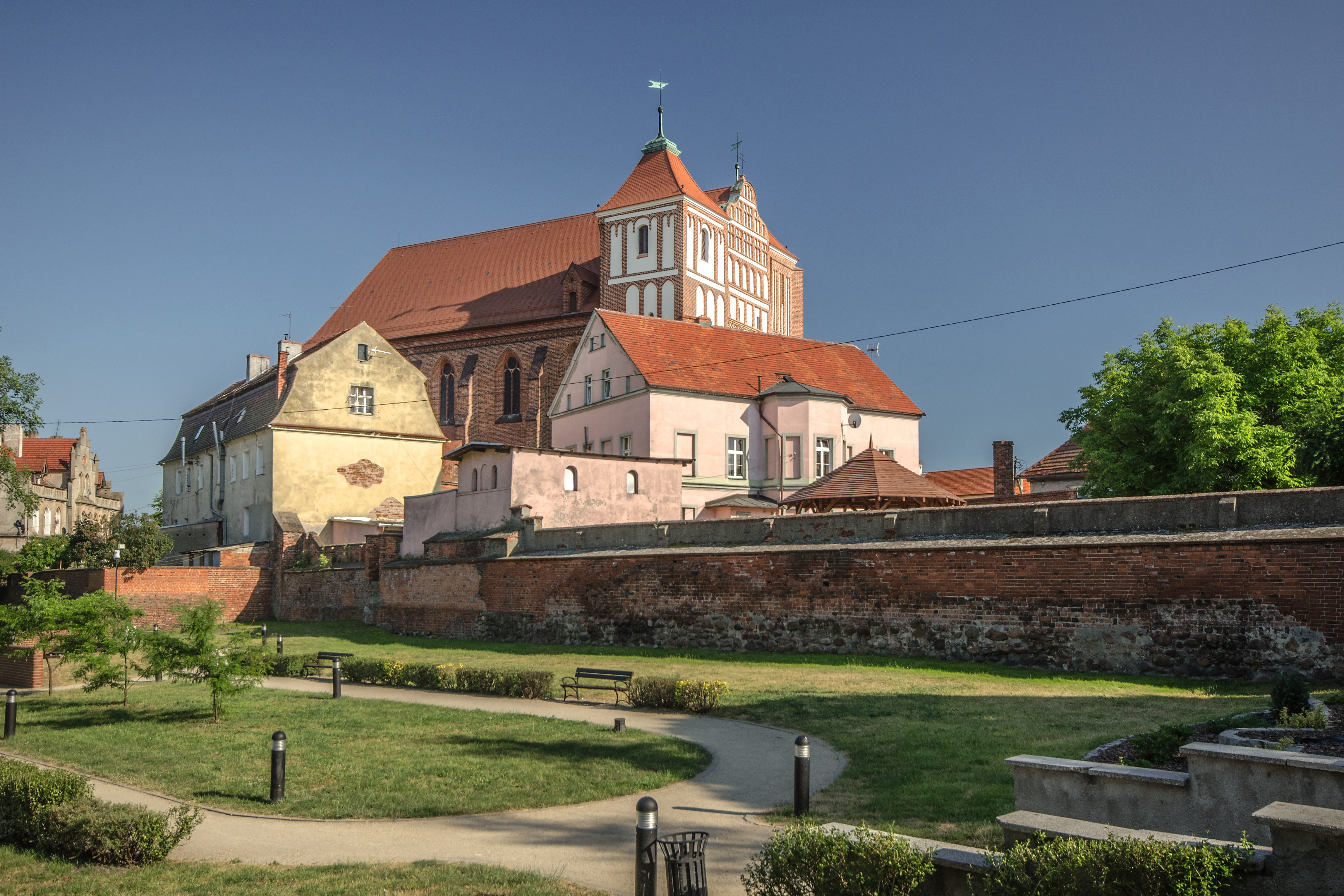 Góra, kościół par. p.w. św. Katarzyny Aleksandryjskiej, 1457-1550